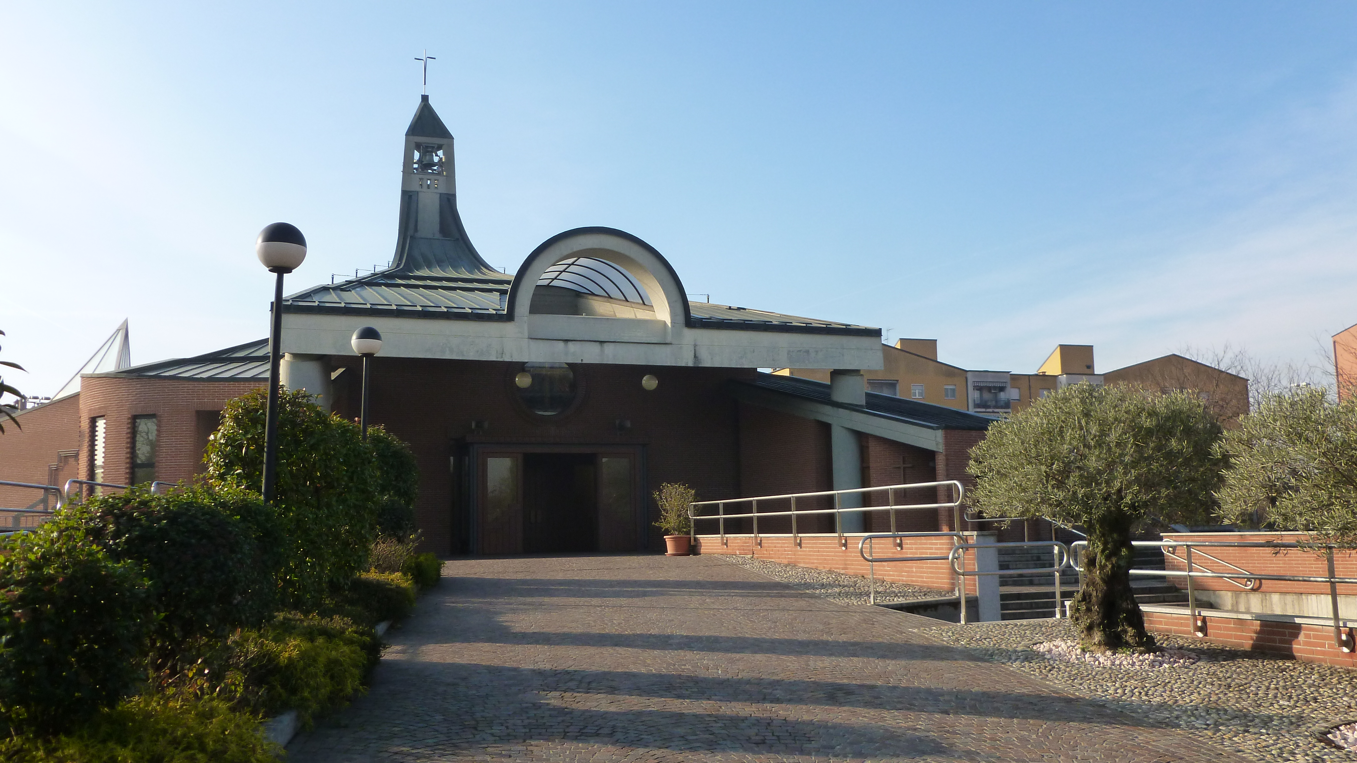 Chiesa di San Carlo in Brugherio